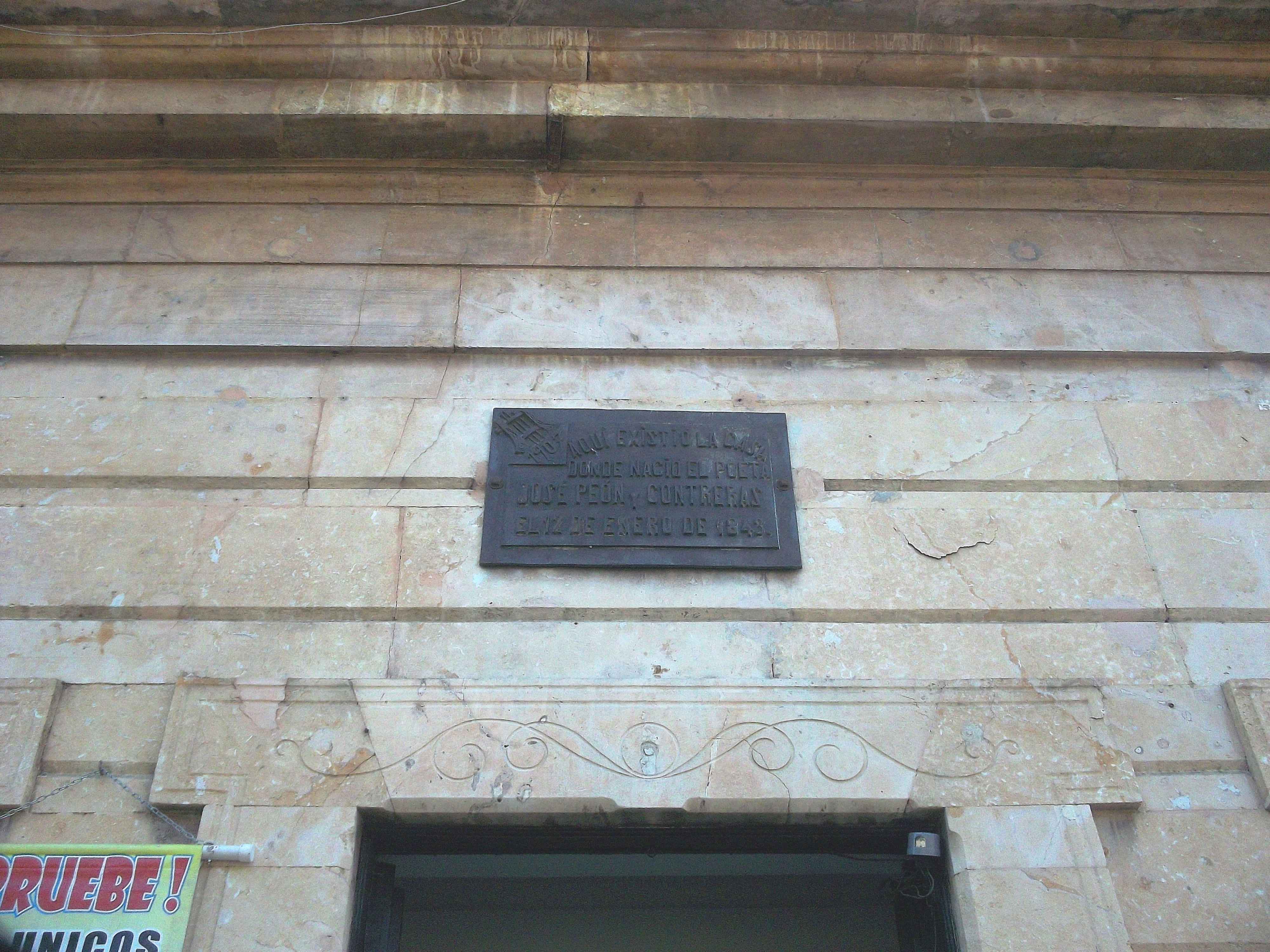 Placa conmemorativa que señala donde se encontraba la casa de nacimiento de José Peón y Contreras, Mérida, Yucatán.